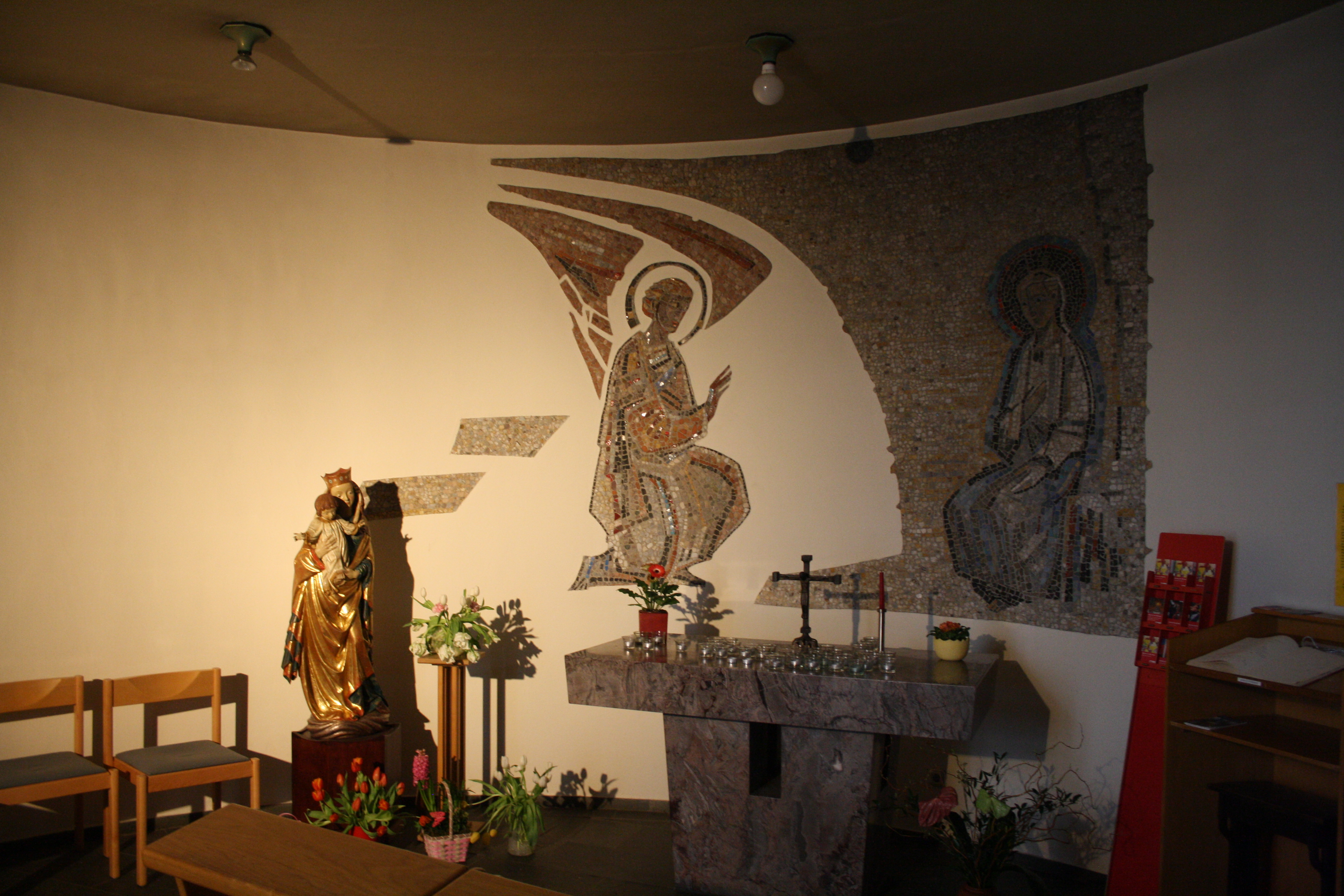 Heilig-Geist-Kirche (Stade